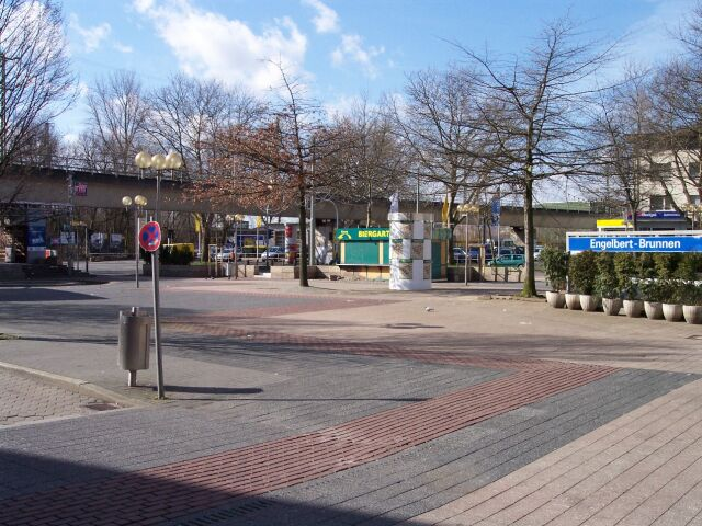 Bild aus Bochum / hierbei handelt es sich um den Konrad-Adenauer-Platz, auf dem im Sommer ein riesiger Biergarten zu finden ist. Der Engelbert-Brunnen ist etwa 150 Meter weiter die Kortumstraße hinauf.